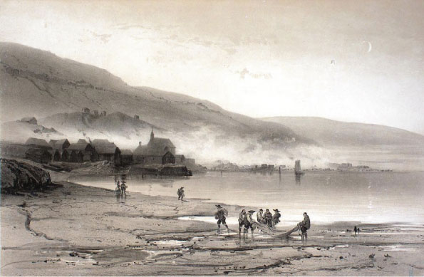 Kollafjørður, Faroe Islands 1839